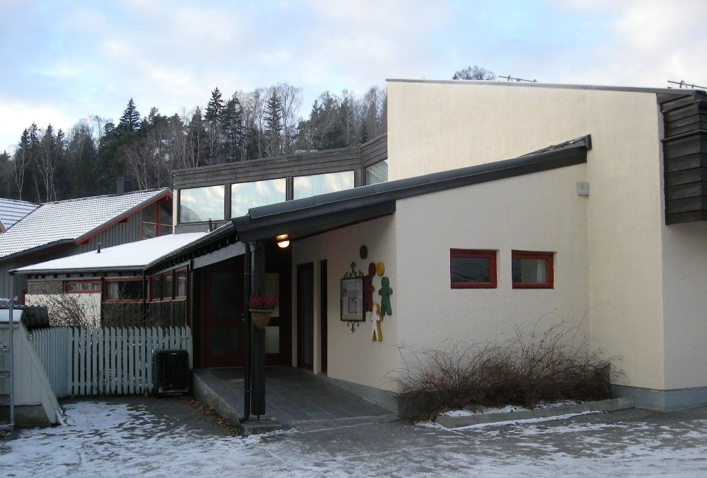 Ringebu ungdomssenter (med kapell)